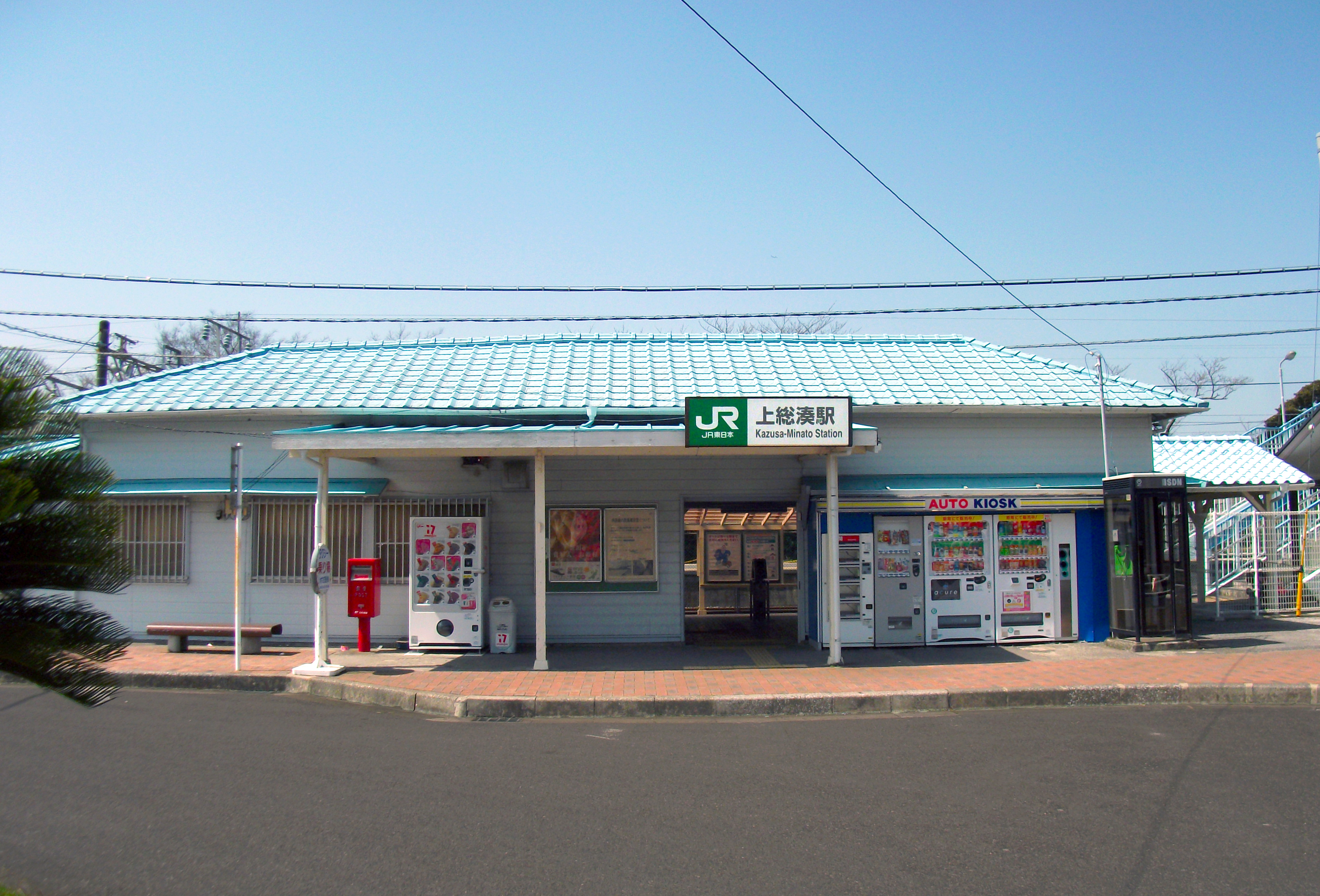 JR内房線 上総湊駅